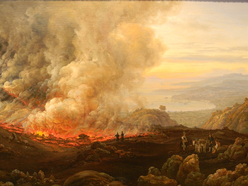 Johan Christian Dahl, éruption du Vésuve, 1824